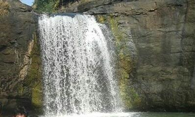 Kalmandvi waterfall jawhar.